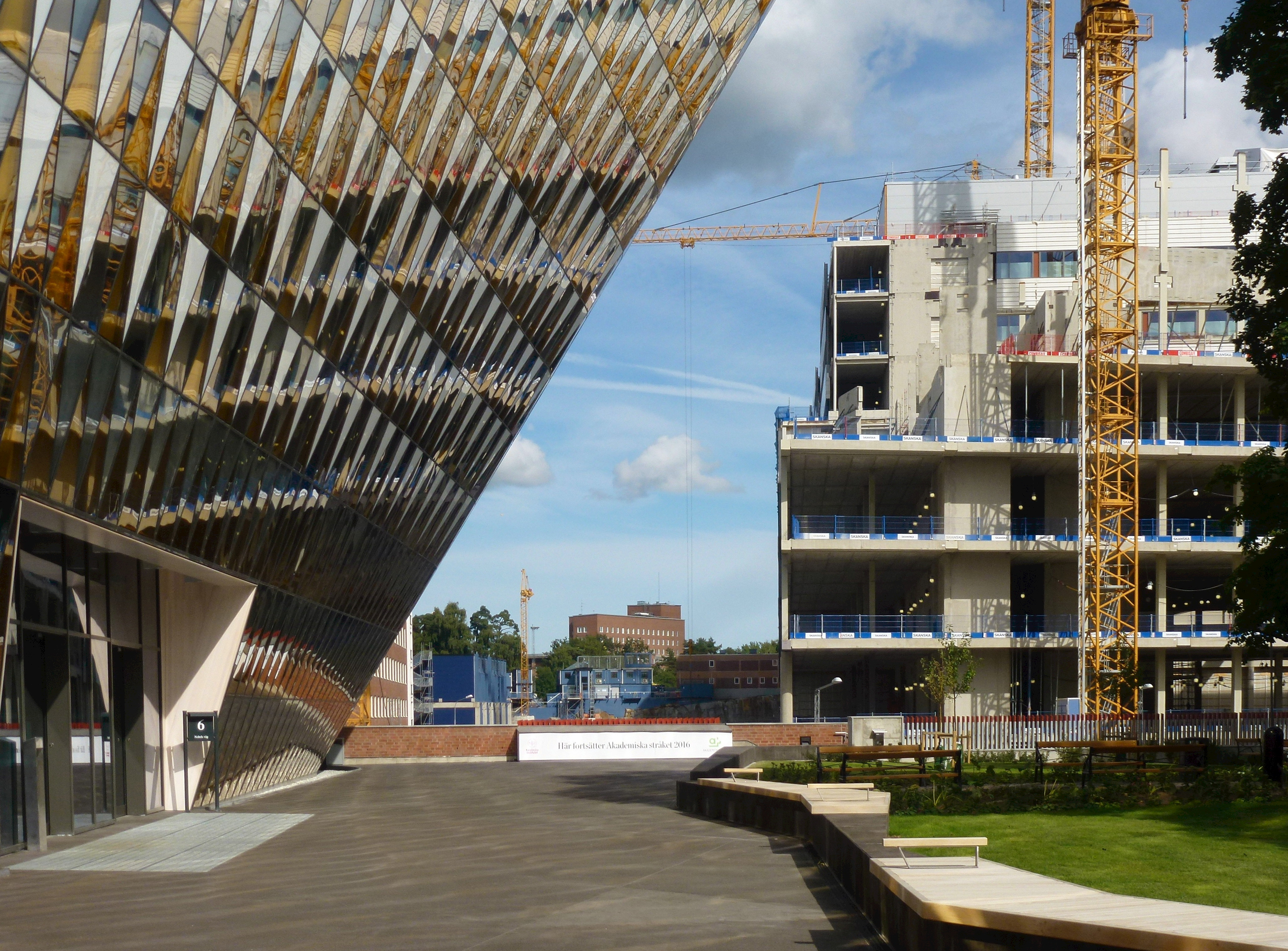 Karolinska institutets aula med Nya Karolinska i bakgrunden